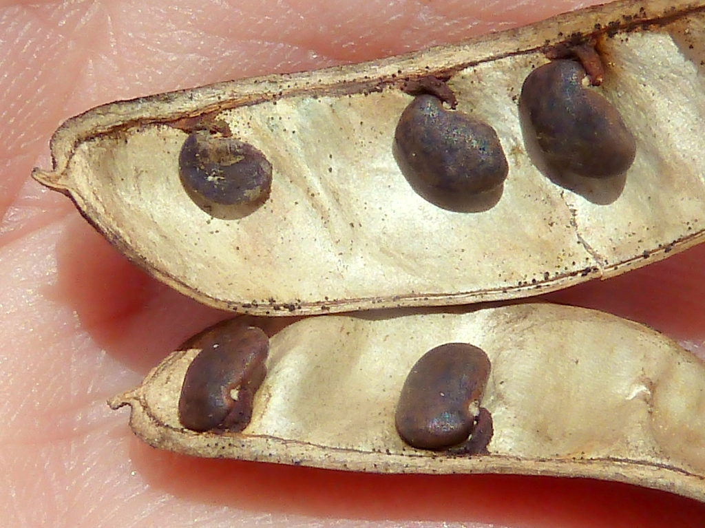 Robinia pseudoacacia (Robinia) : Semillas in situ en su vaina abierta - Calle del Palacio, Nuevo Baztán, Provincia de Madrid (España).